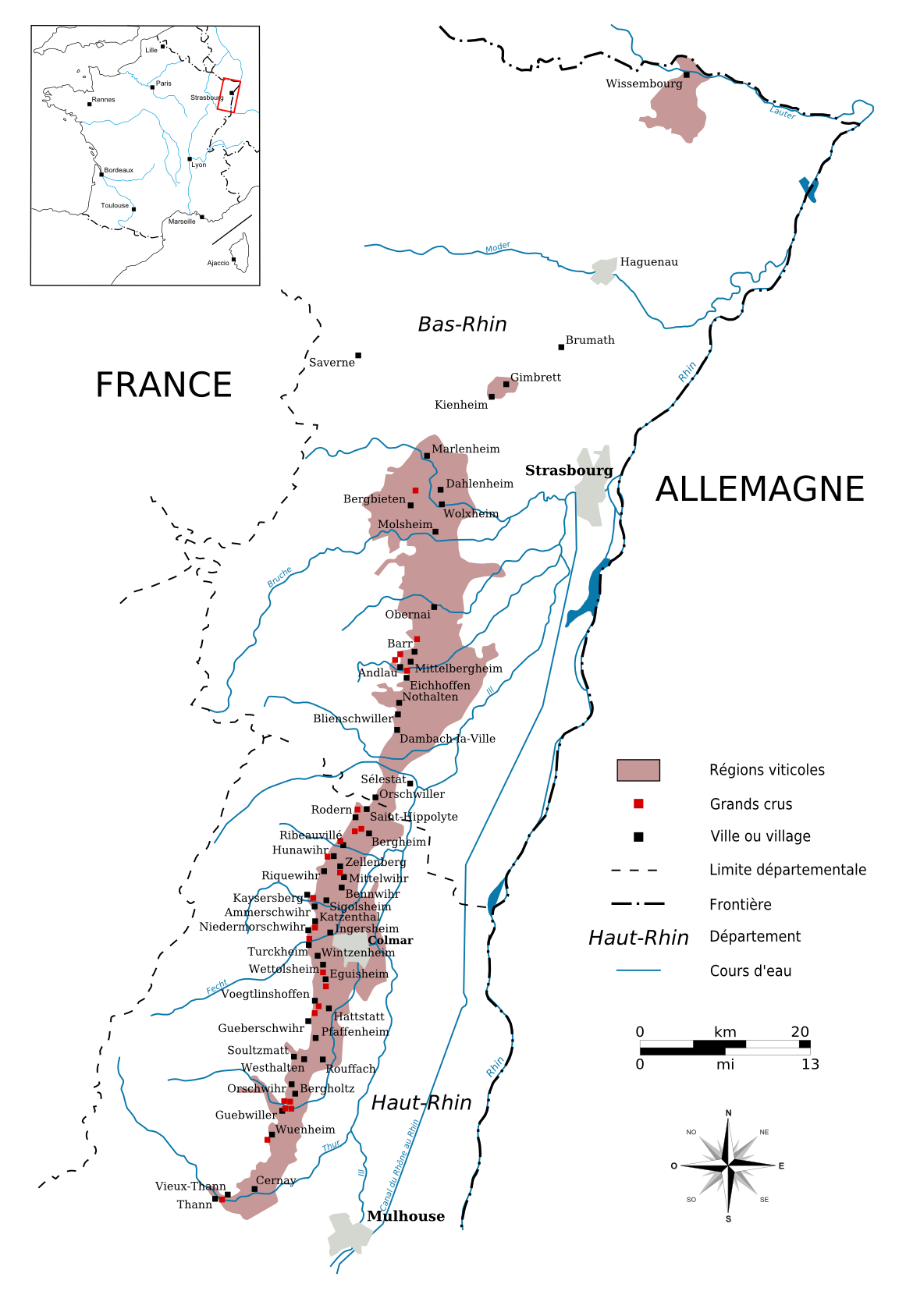 Les vignobles d'Alsace